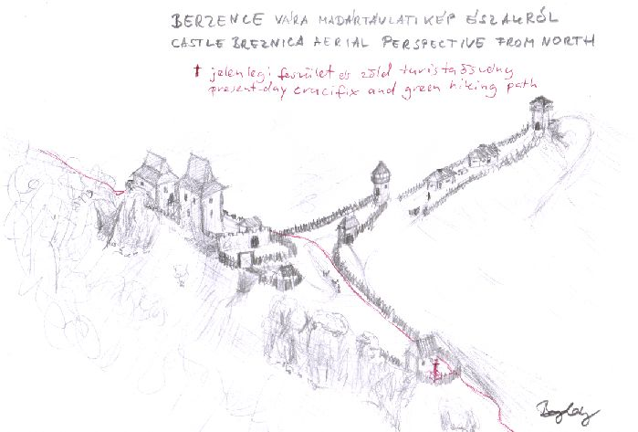 A szlovákiai Berzence vára észak felől, rekonstrukciós rajz